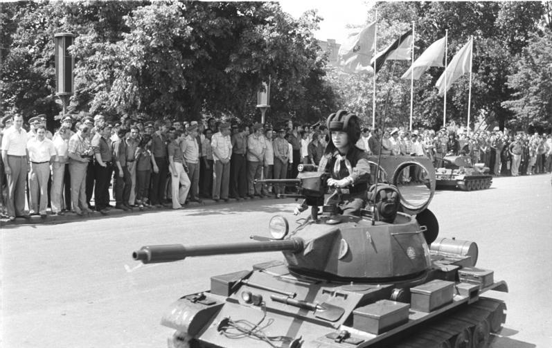 Berlin, Wehrerziehung ADN-ZB / Mittelstädt / 2.6.1979 Berlin: Festival Im Zentrum "Wir schützen unser sozialistisches Vaterland". - Vorführungen der Pionierpanzerbrigade der Station "Junger Touristen" Bad Schmiedeberg. [Berlin.- Junge Pioniere in Miniaturpanzer bei Parade]